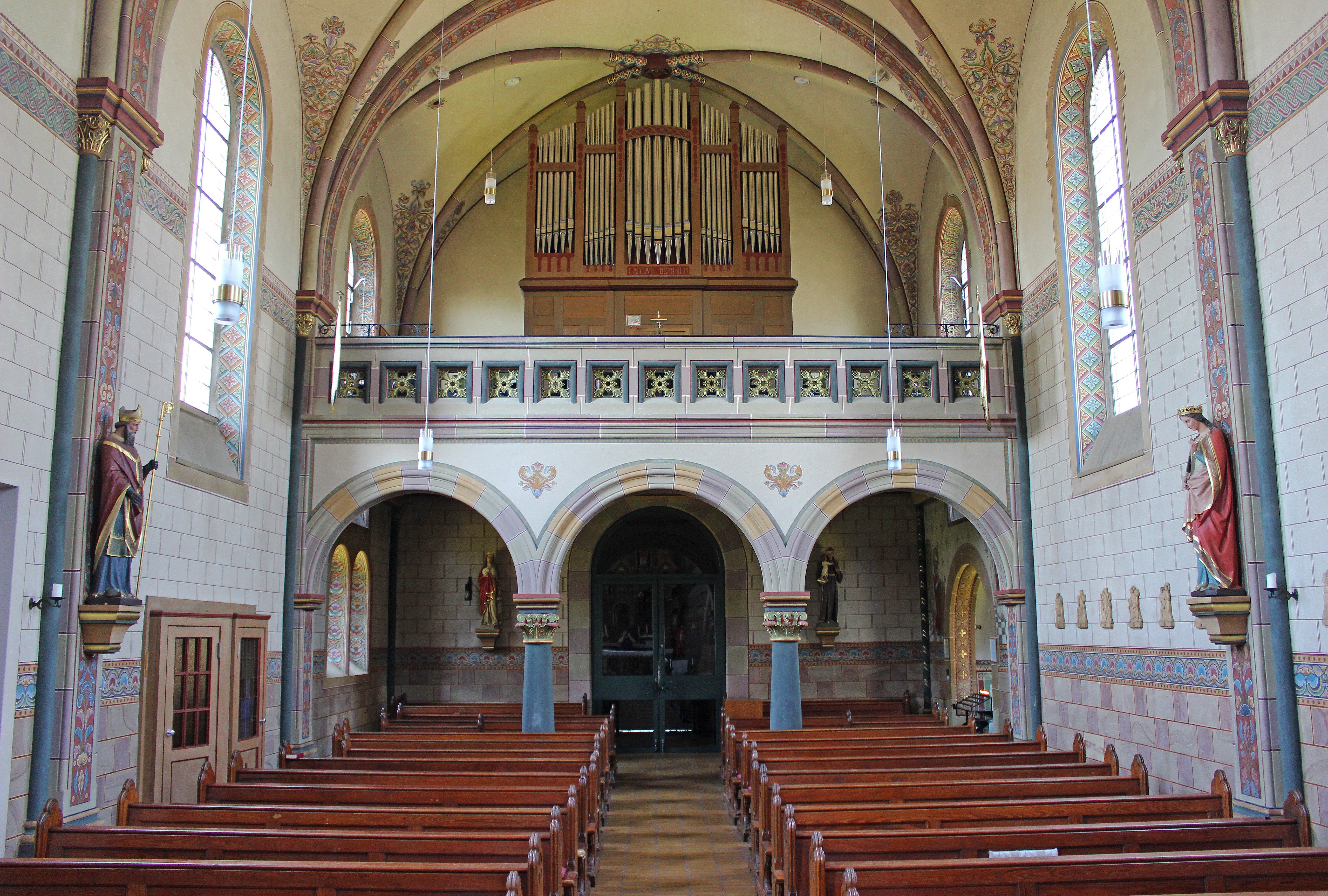 Blick ins Innere der katholischen Kirche St. Medardus in Neuforweiler, einem Stadtteil von Saarlouis, Saarland